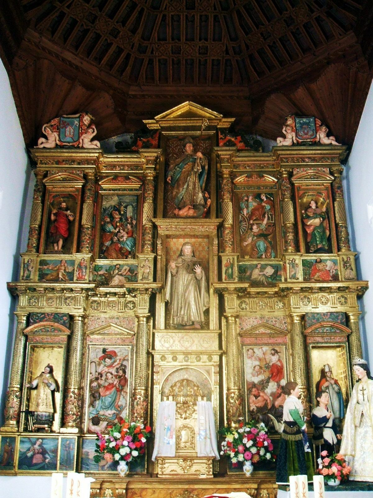 Retablo mayor (s-XVII) de la iglesia del Monasterio de Santa Sofía (MM Canónigas Norbertinas Premonstratenses), Toro, Zamora, Castilla y León, España